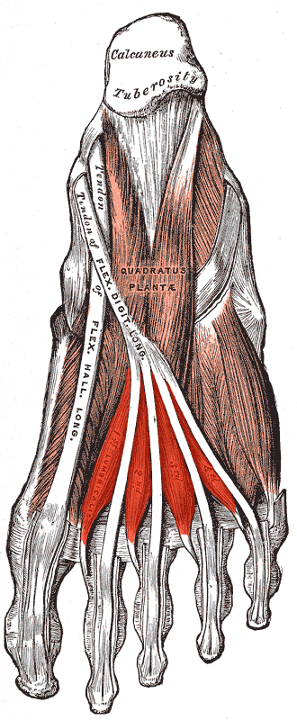 Lumbricales pedis muscles